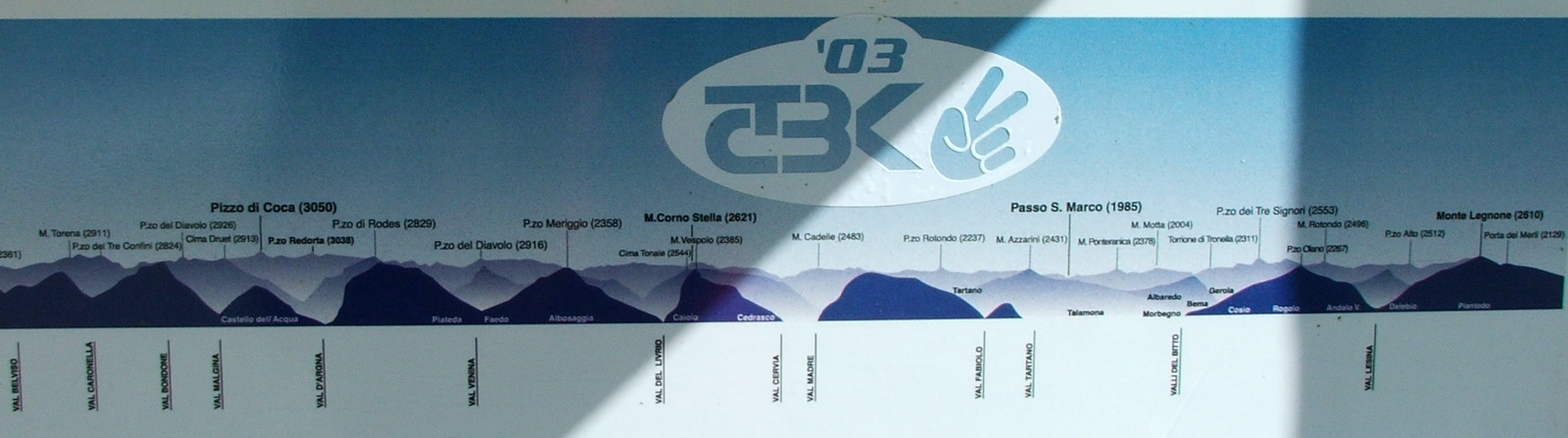 foto cartello altimetria orobie valtellinesi